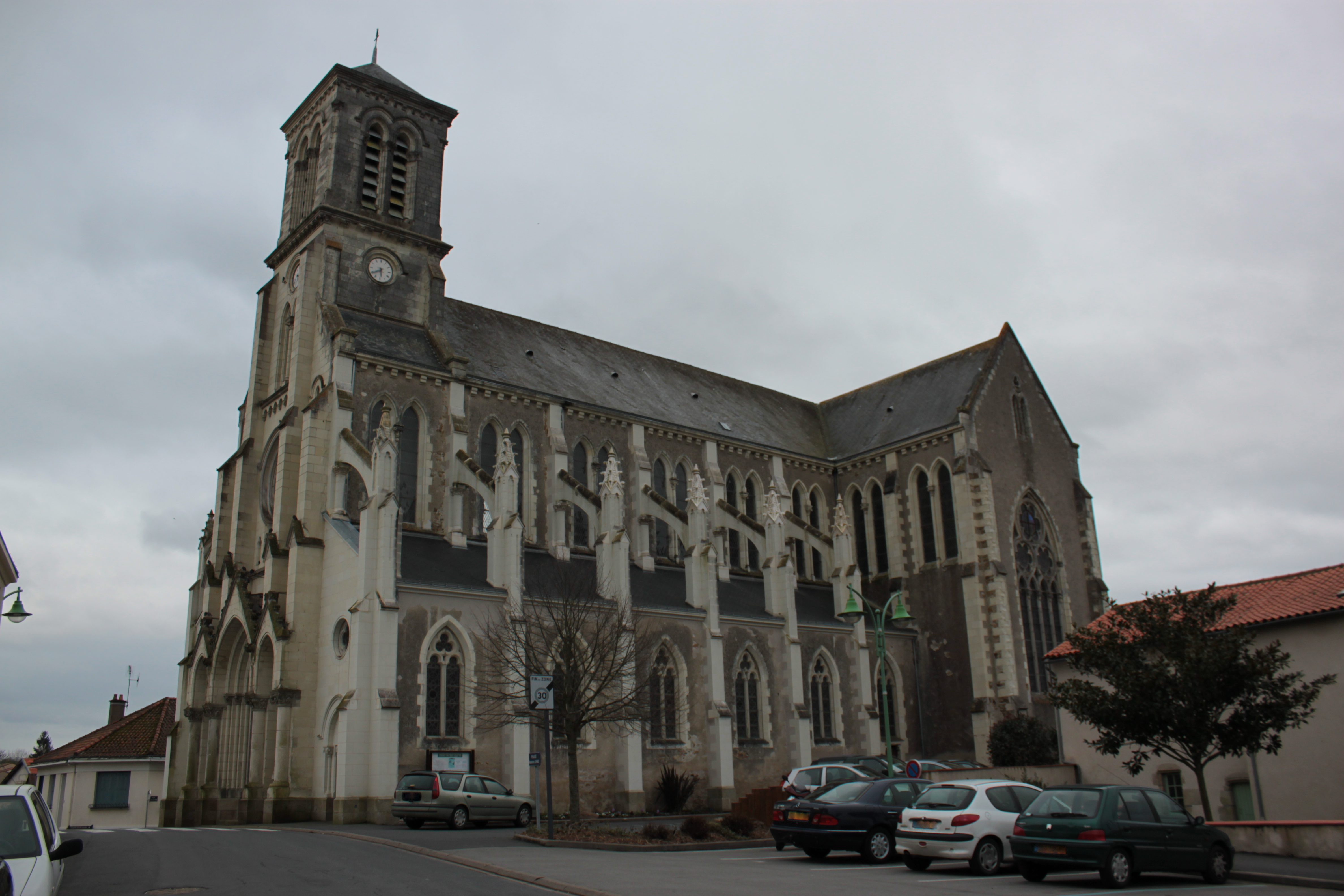 Église Saint-Martin, XIX°, Mouzillon.